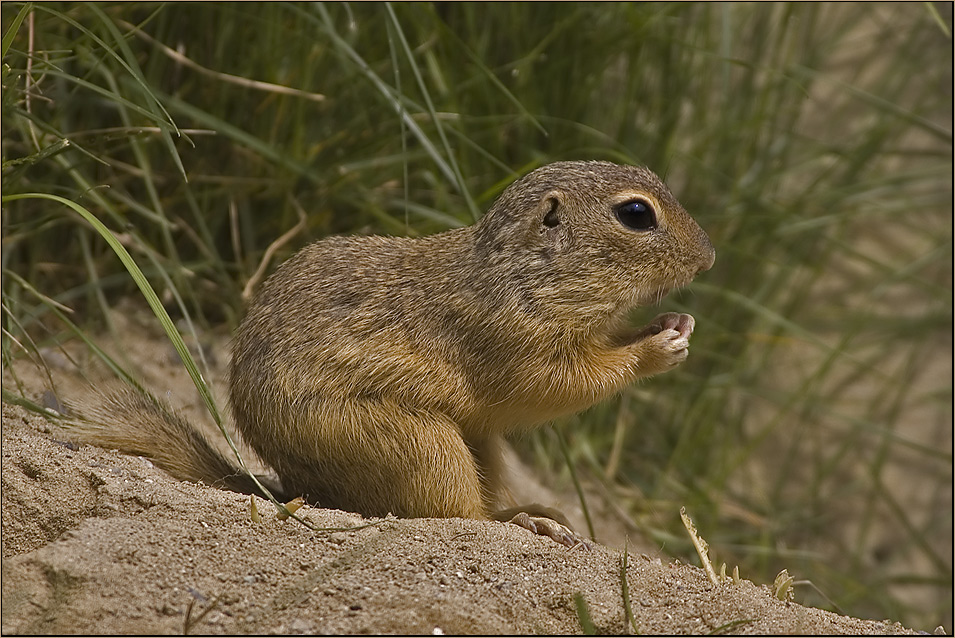 Europäischer Ziesel